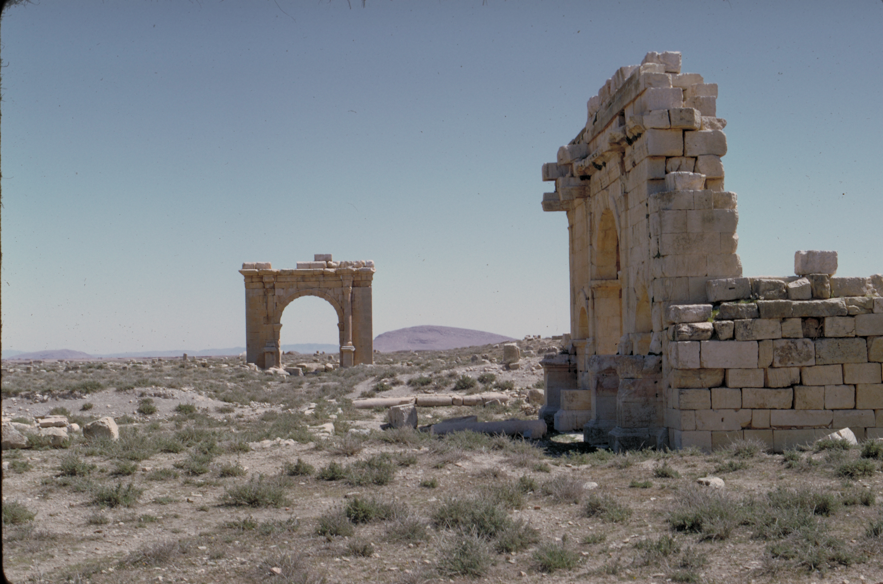 Photographie prise à Zana sur le site romain de l'antique Diana Veteranorum